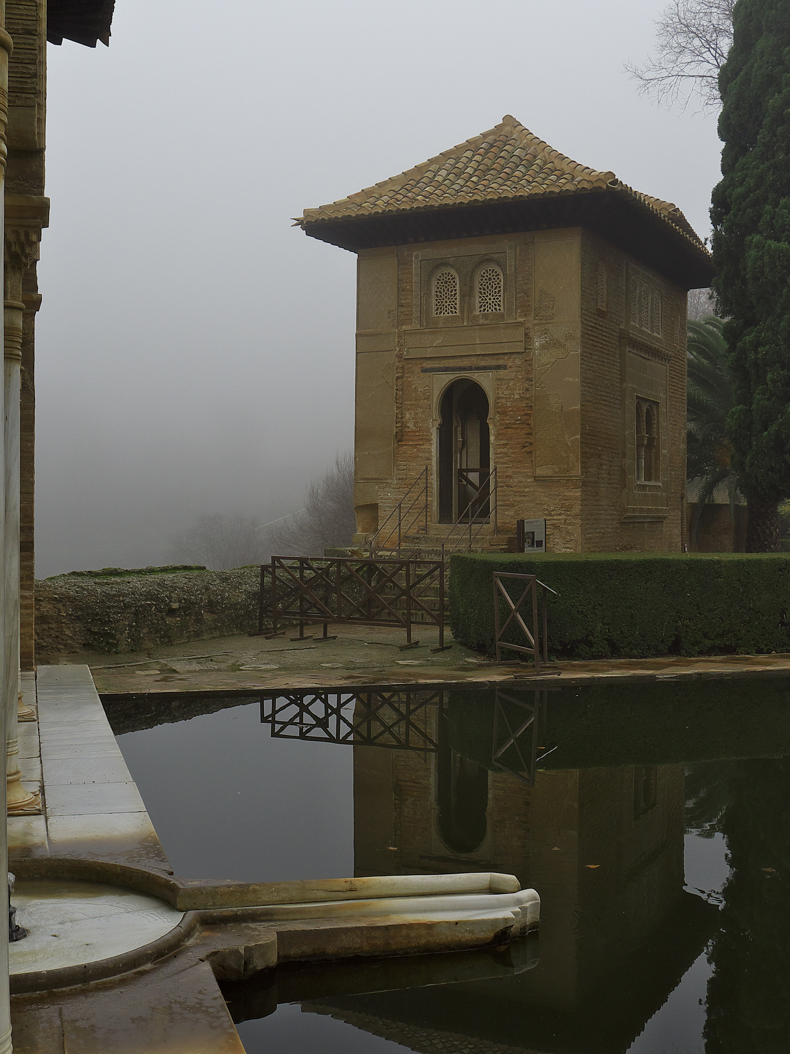 Construido por el emir Yūsuf I de Granada (1318-1354)